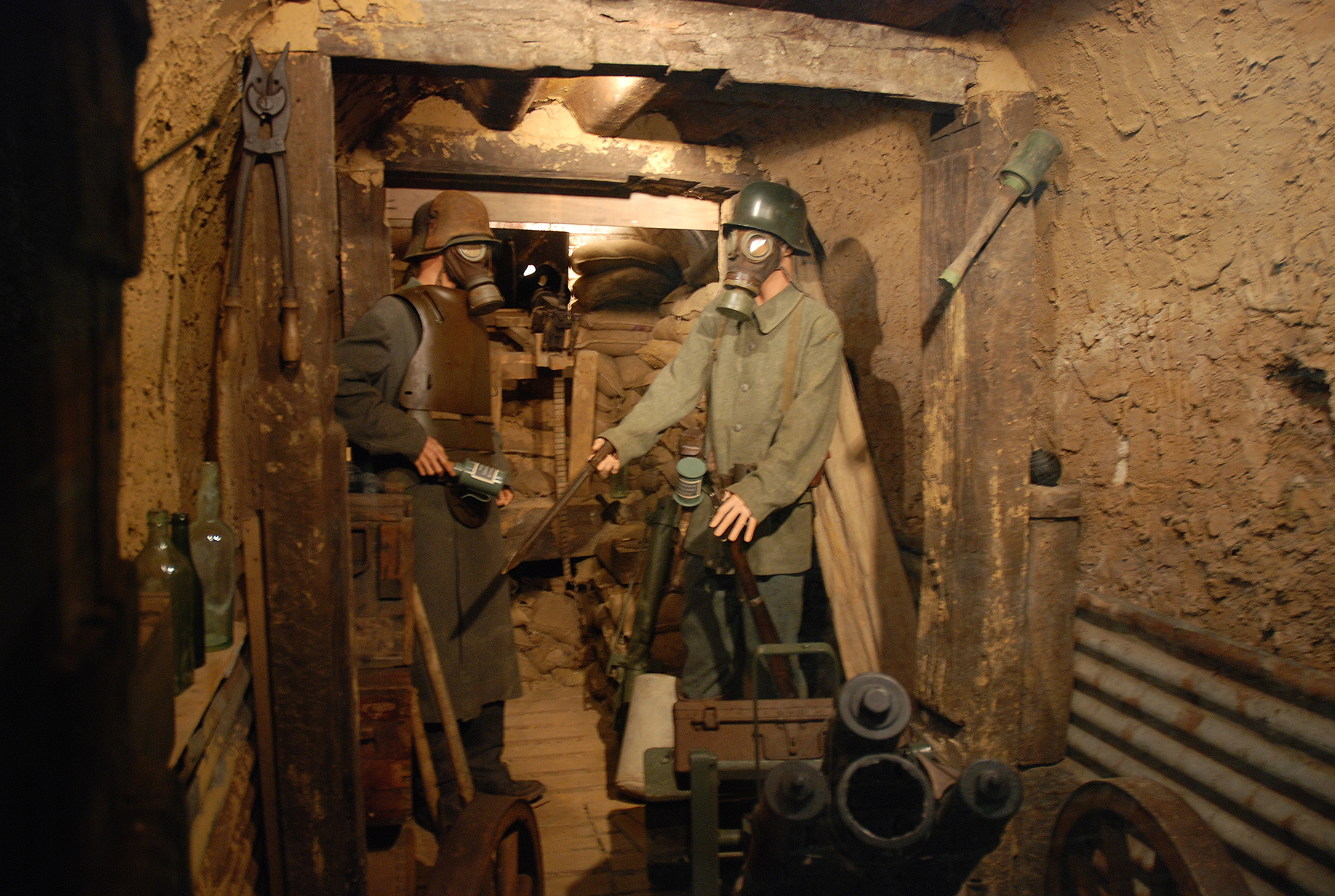 het Museum Somme 1916 in Albert, Frankrijk